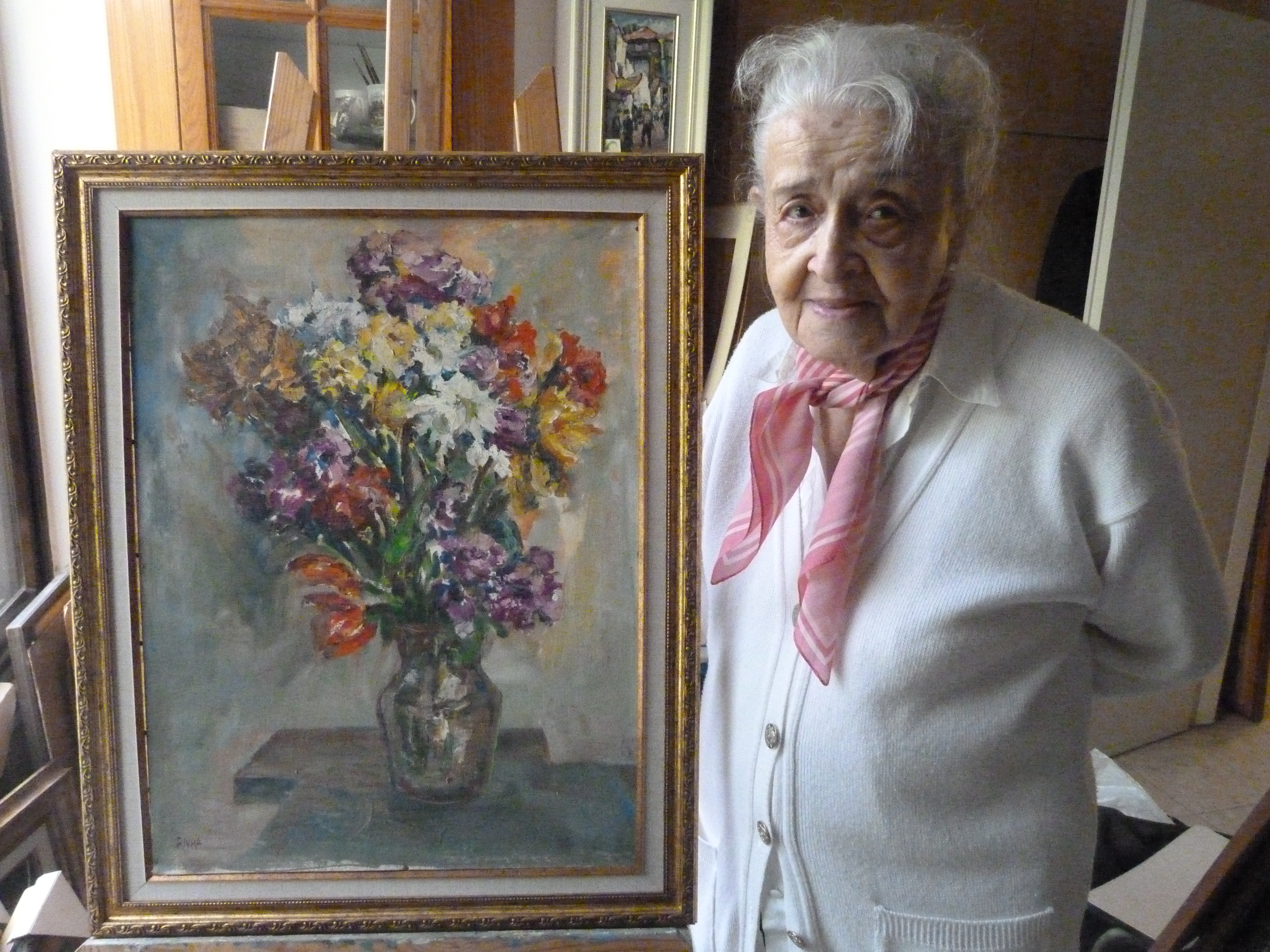 Ривка Хволес-Лихтенфельд у себя дома (фото 24 января 2016)